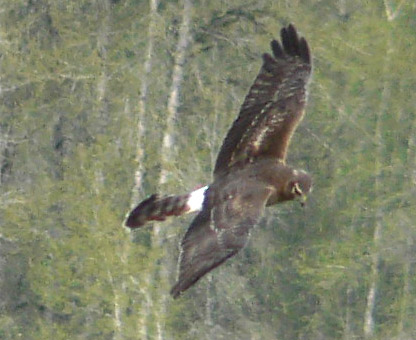 Juvenile Circus hudsonius